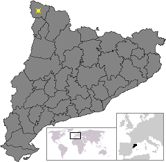 Localització de Vielha. Location of Vielha in Catalonia.